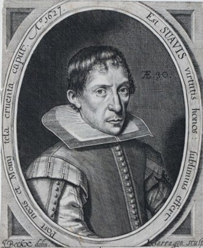 Portrait de Samuel de Swaef (1627).